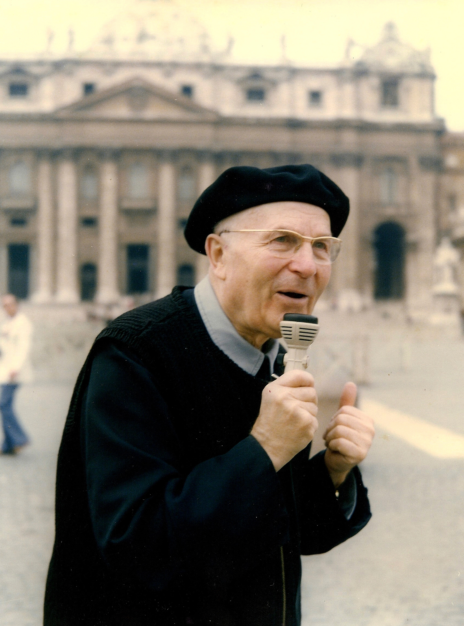 Monseigneur Joseph Robert à Rome, sur la place Saint-Pierre, lors d'un pèlerinage organisé par les "Voyages et Pèlerinages de Lugny" en 1979.